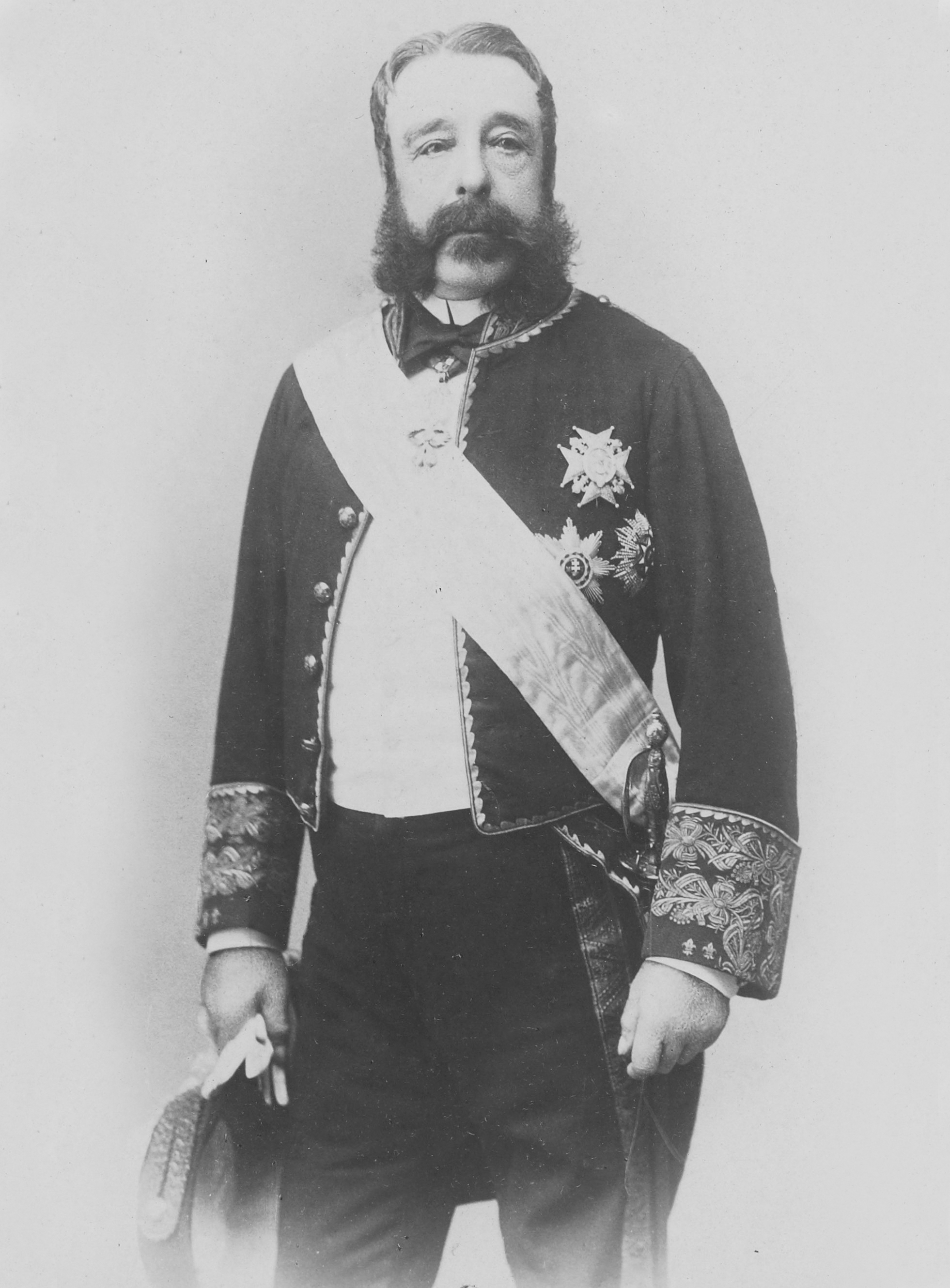 Exposition universelle de 1900 : portrait de José Osorio y Silva.